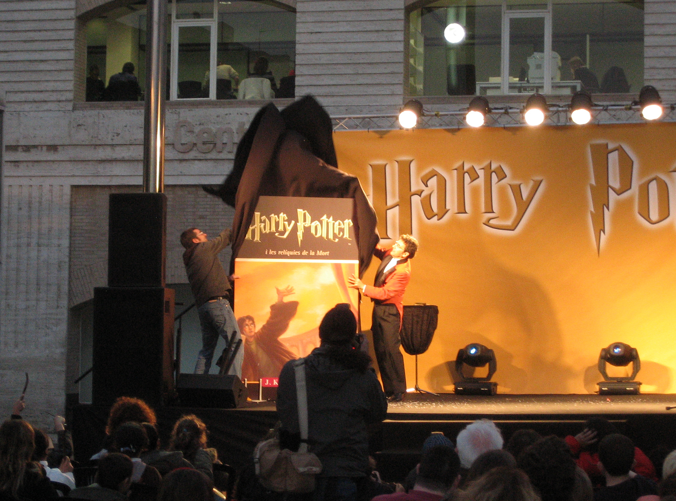 Descobriment de la coberta del nou i últim llibre del Potter a la Plaça dels Àngels, on molts nens (i no tan nens) esperaven nerviosos aquest moment.